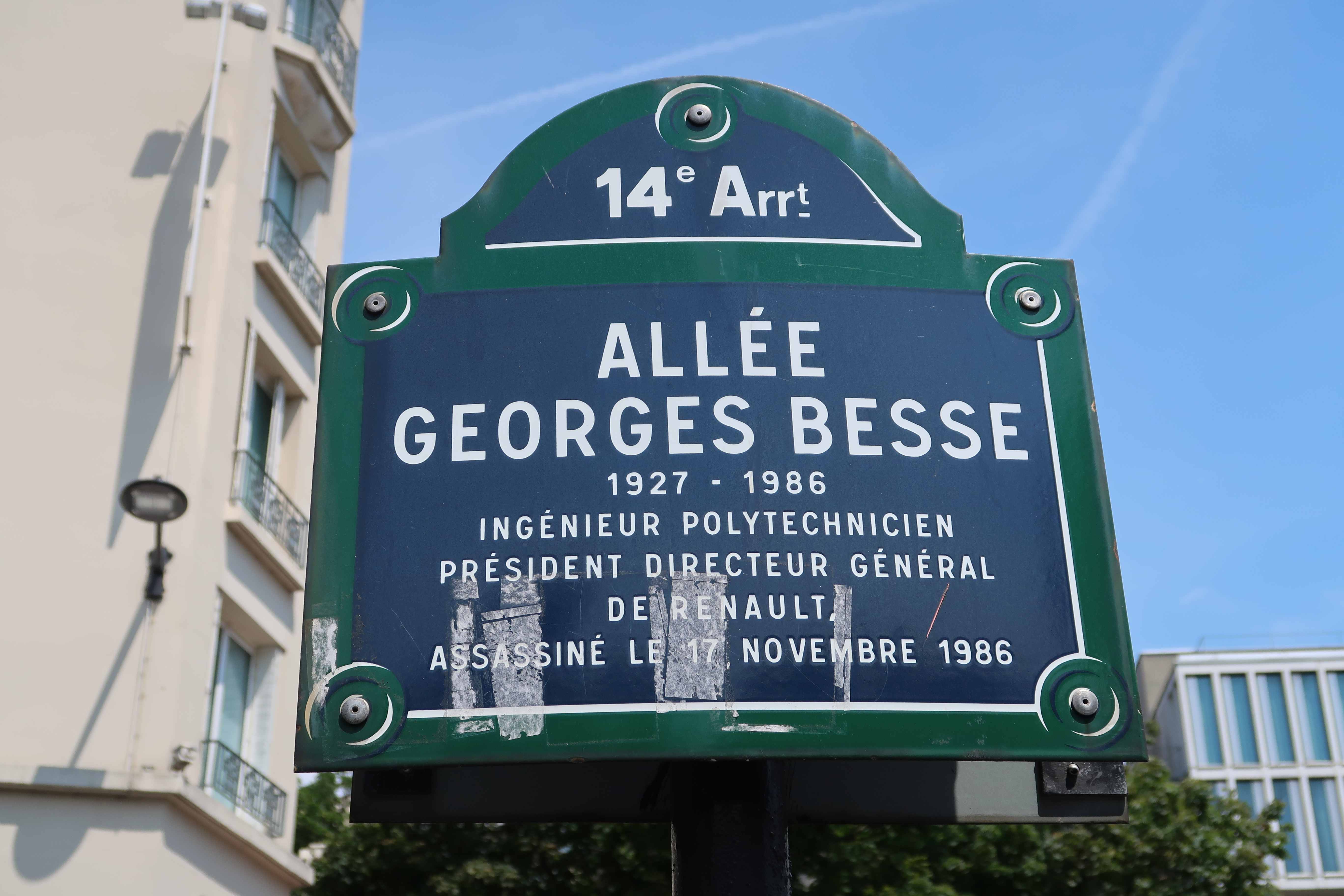 Plaque de l'allée Georges-Besse, comprise dans le boulevard Edgar-Quinet (Paris, 14e).